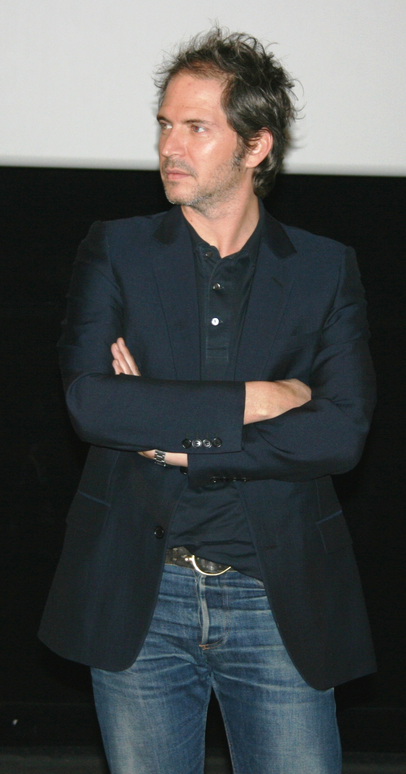 Christopher Thompson à l'avant-première de Didine diffusée à l'UGC Ciné Cité Les Halles, à Paris.